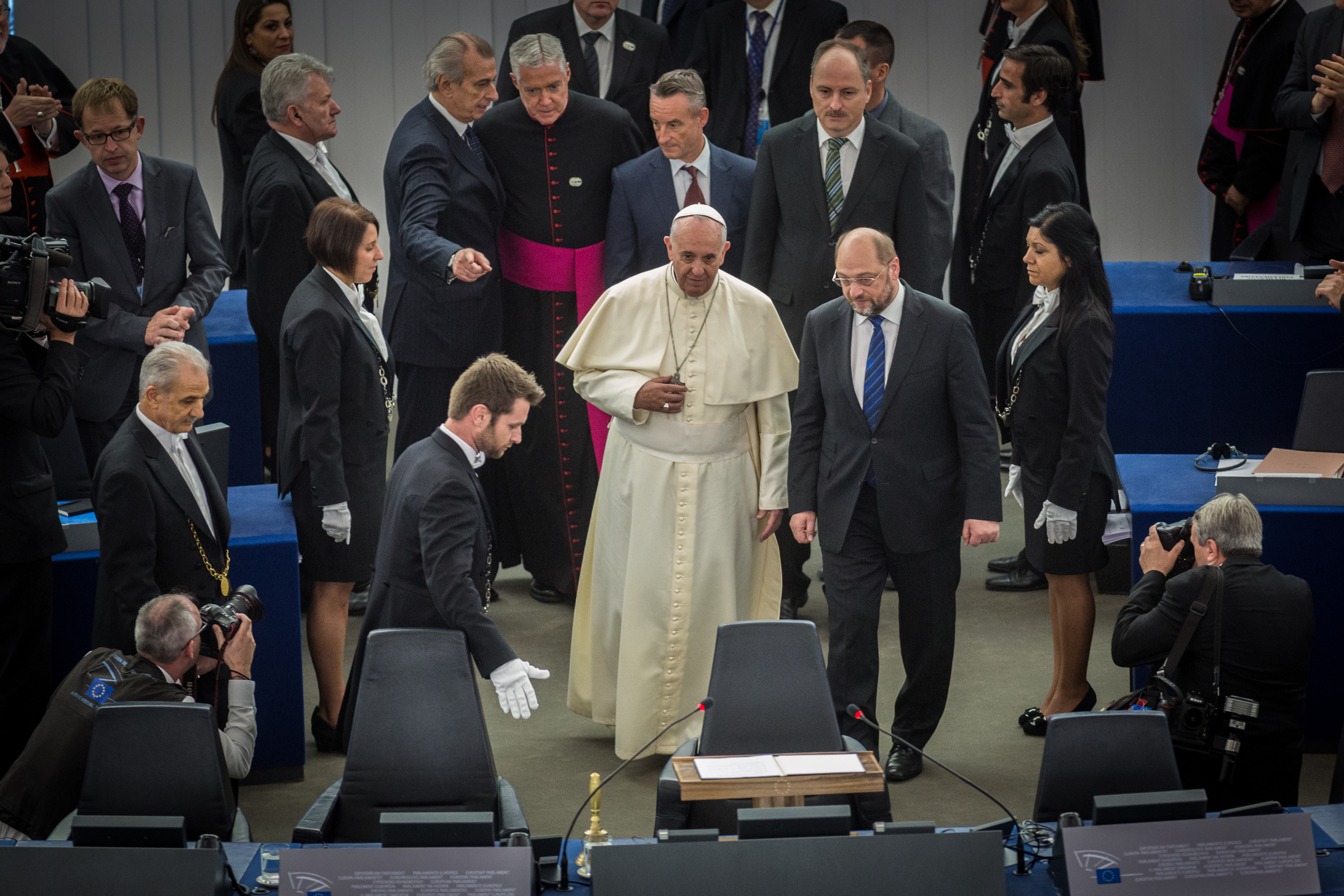 Visite du pape François au Parlement européen de Strasbourg.